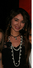 A Atriz Daniela Luján nos Estados Unidos em 2011